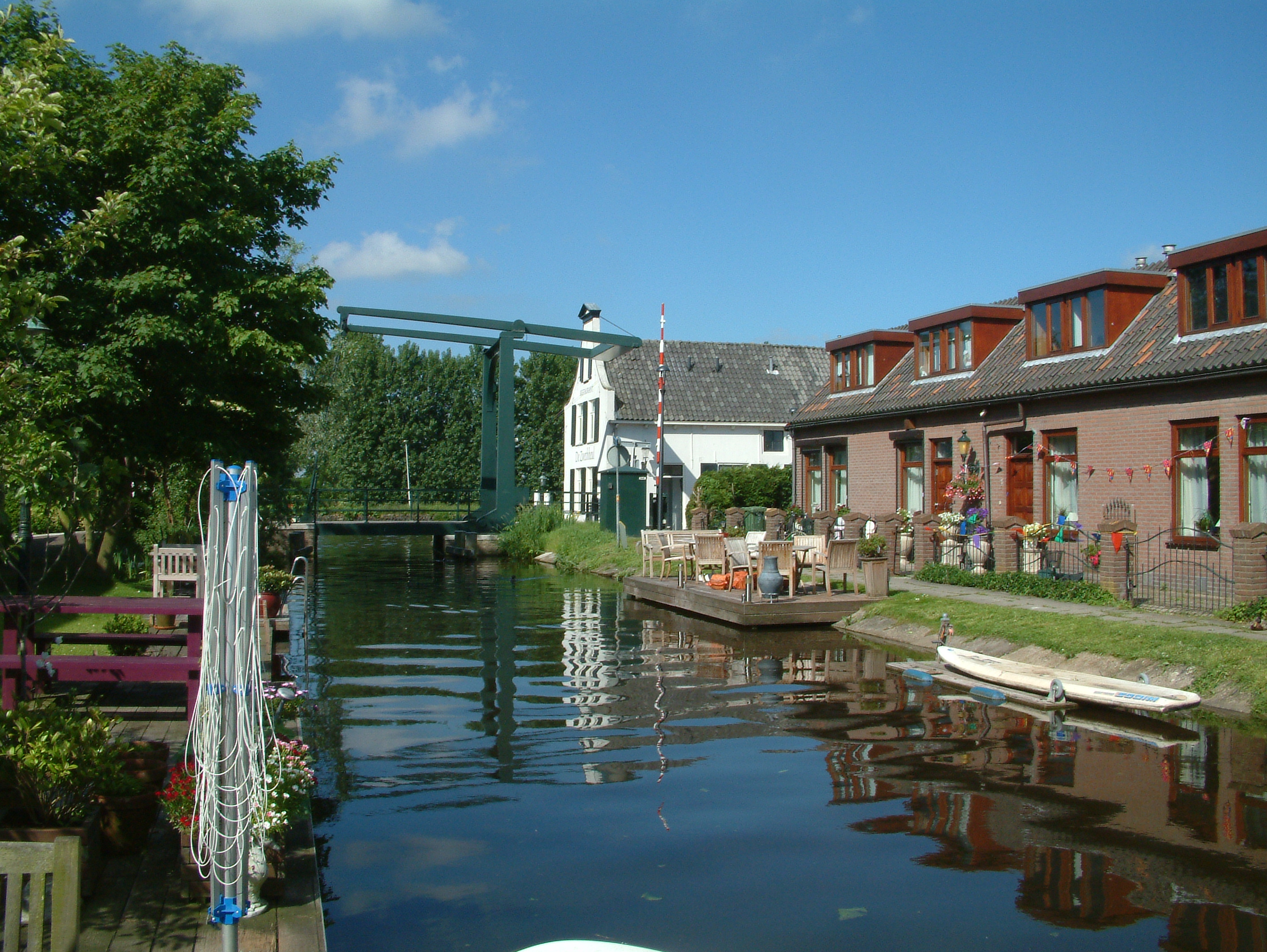 De Zweth tussen Rotterdam en Delft